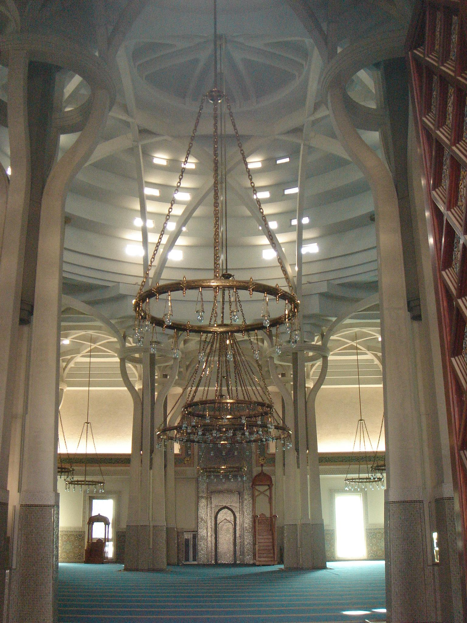 Roma , Moschea: il pulpito